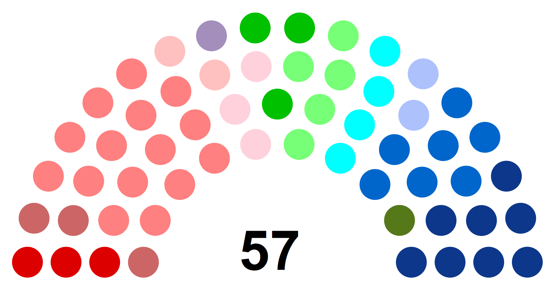 Partis politiques représentés au Conseil régional de Picardie en 2014